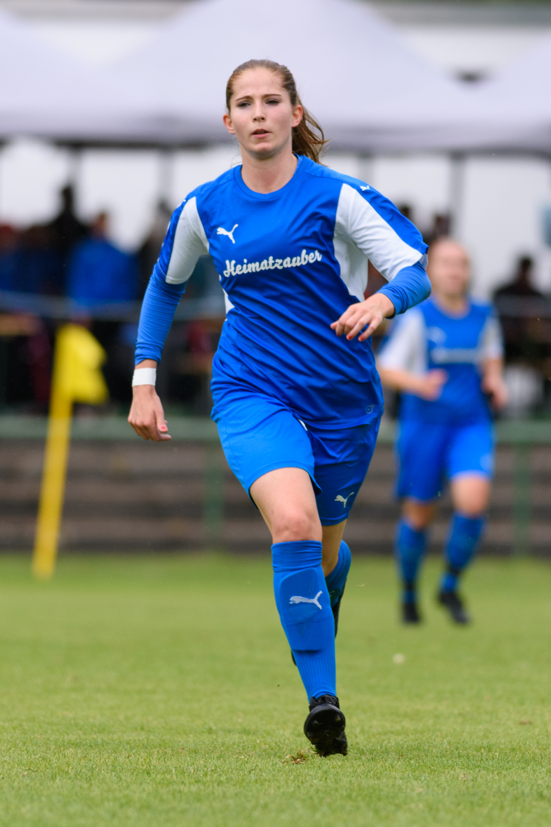 Lisa Flötzner im Juli 2019 während eines Testspiel gegen FC Bayern II